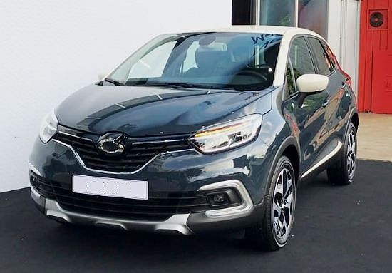 ルノーサムスン・QM3